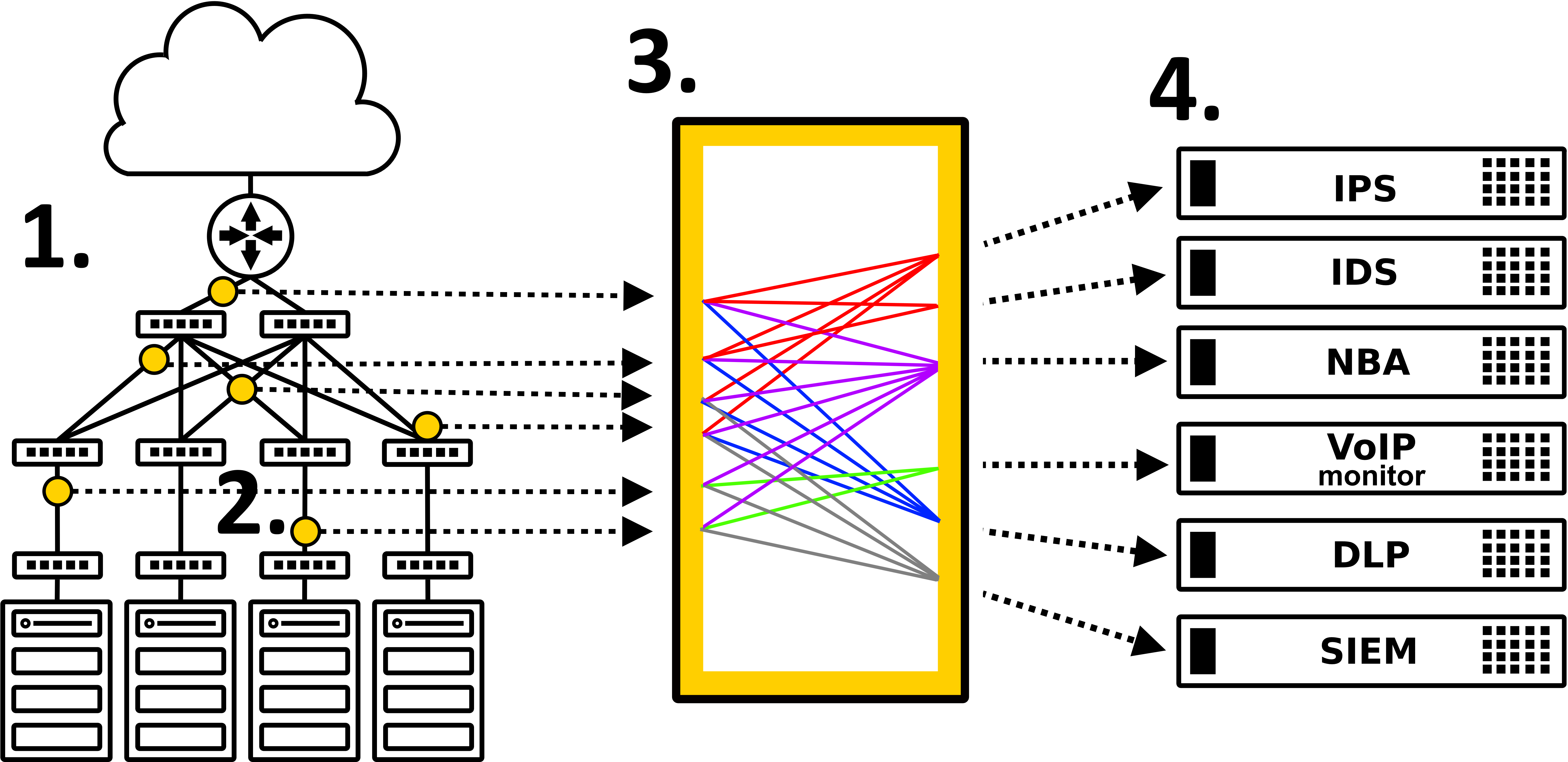 Применение брокера сетевых пакетов при подключении средств мониторинга и анализа трафика к компьютерной сети позволяет повысить эффективность использования данных средств за счет централизованного сбора трафика и выполнения общих функций по обработке трафика брокером сетевых пакетов. Брокер сетевых пакетов фильтрует и модифицирует потоки трафика, осуществляет распределение и балансировку нагрузки, обеспечивая поступление на сервера обработки только необходимого и подготовленного трафика из всего массива собранных в сети данных.